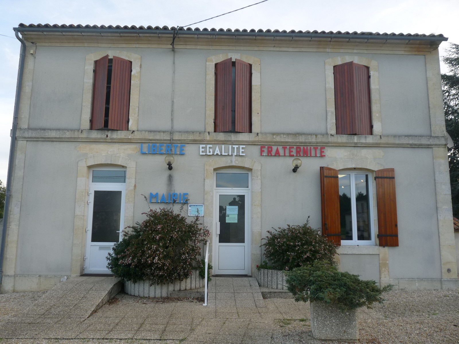 Mairie de Corignac, Charente-Maritime, France